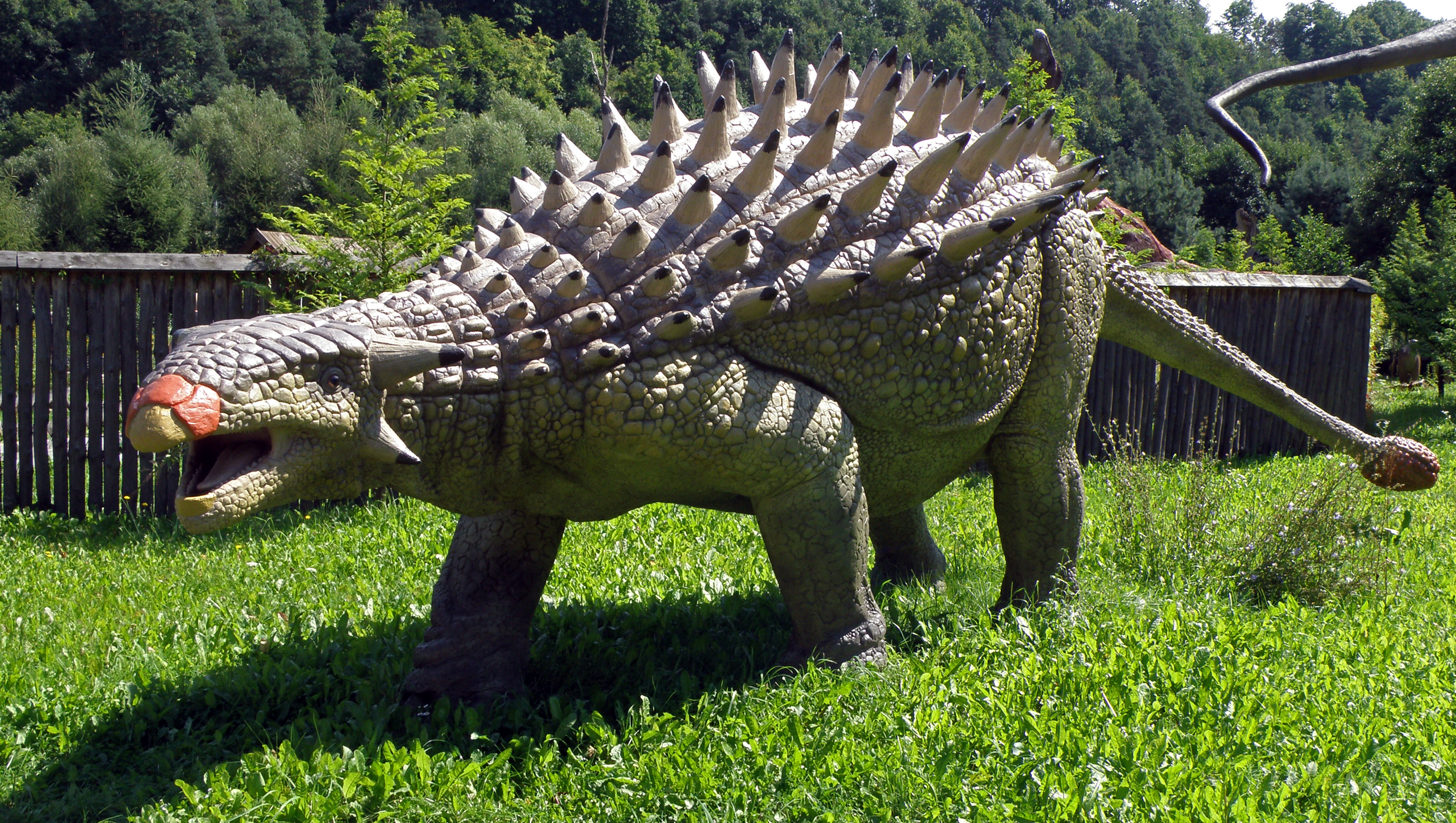 JuraPark Bałtów - Park Dinozaurów - Ankylozaur (Ankylosaurus)